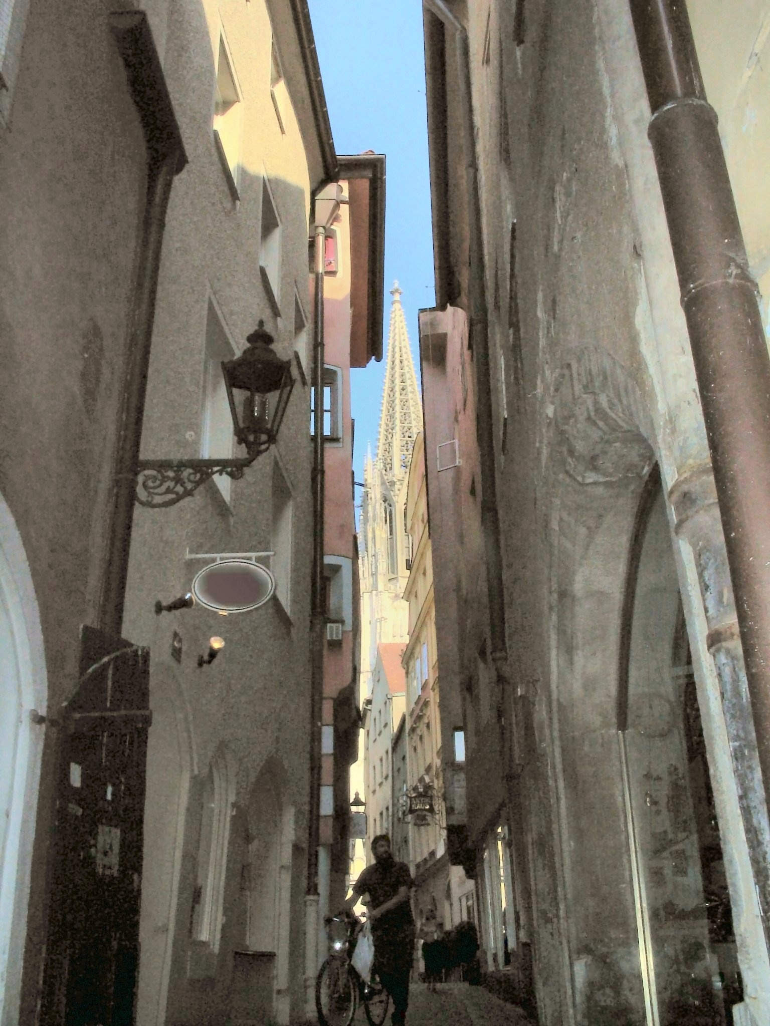 Regensburger Altstadt